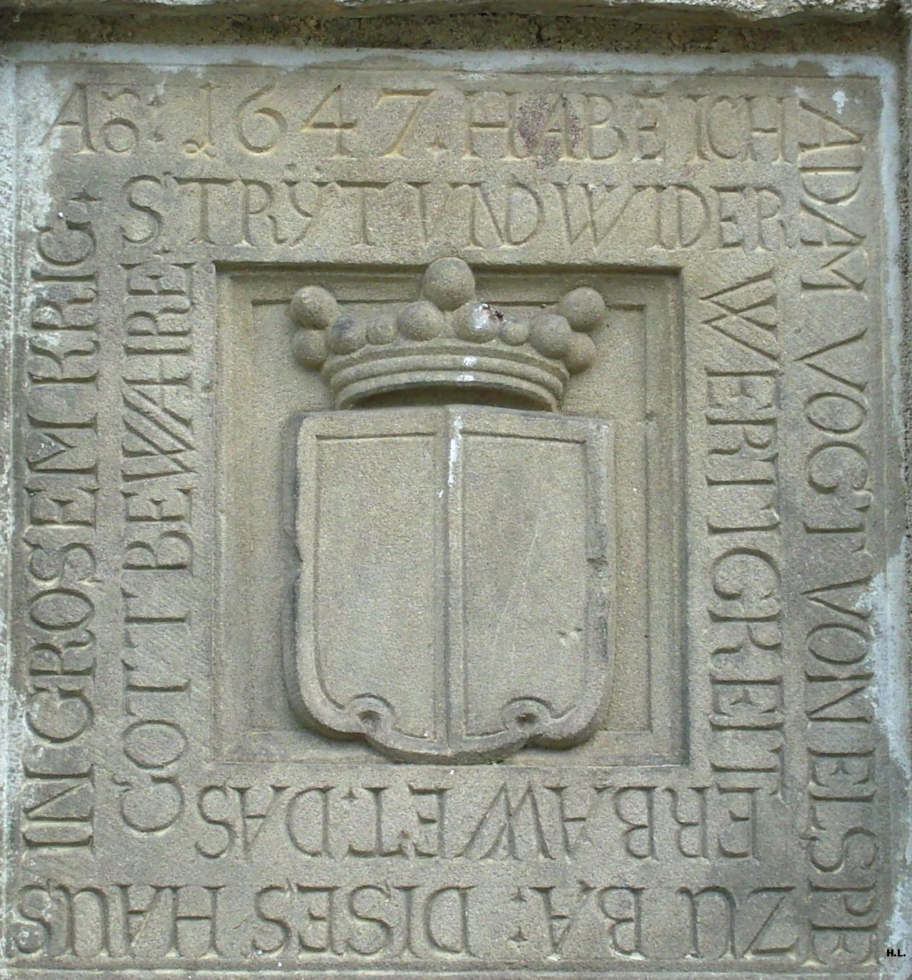 Haus Bamenohl, Platte mit Inschrift von 1647